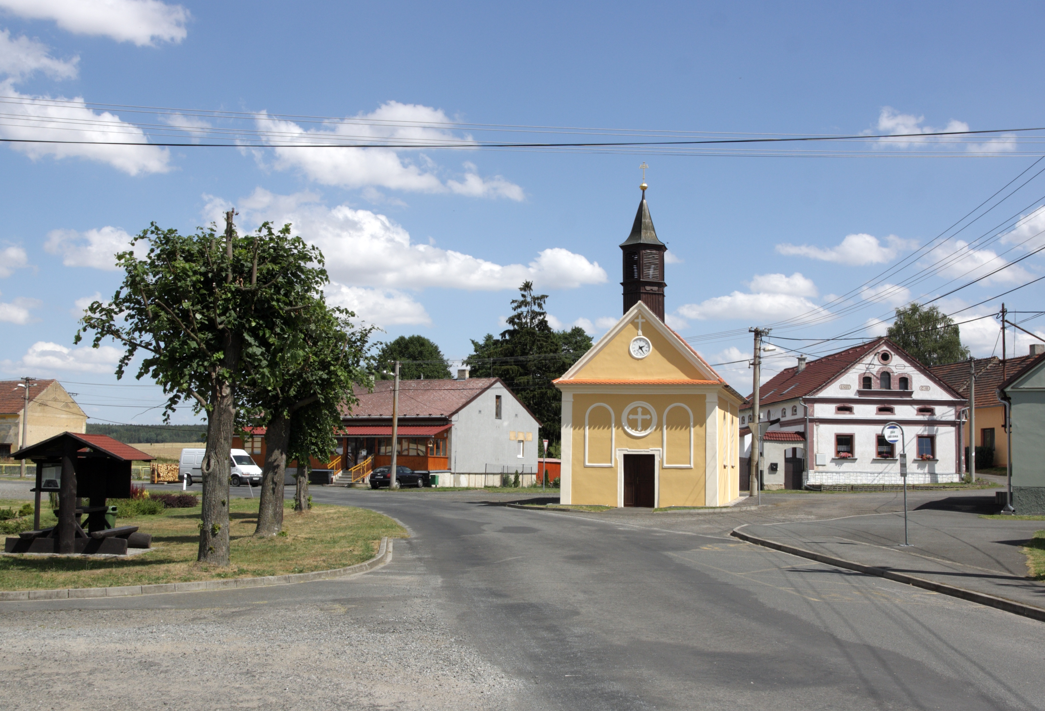 Mezholezy (dříve okres Horšovský Týn) - náves od Z.